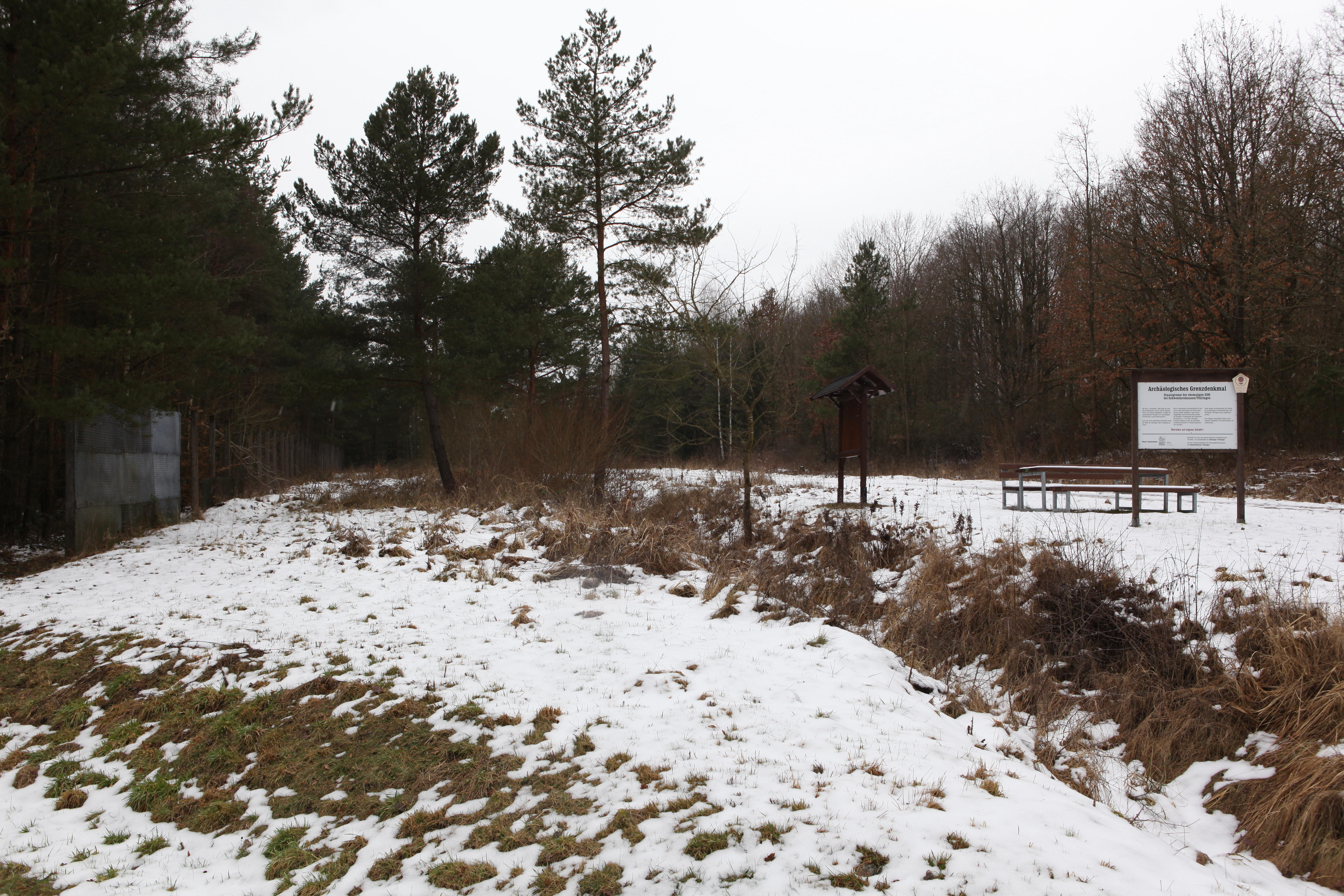 Grenzdenkmal bei Schweickershausen, Landkreis Hildburghausen